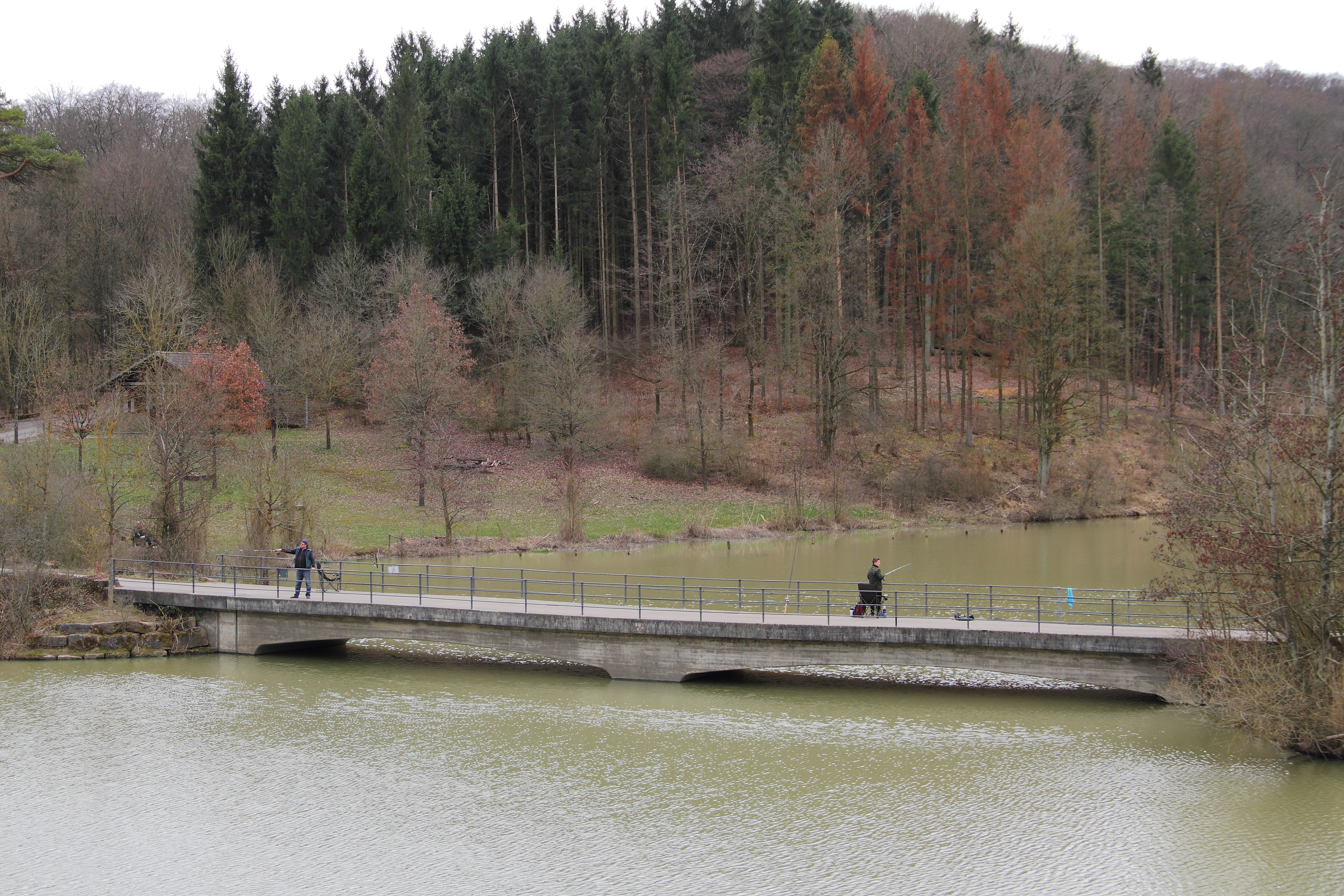 Der Aschbachsee ist ein Stausee des Aschbachs, der sich auf der Gemarkungsgrenze zwischen den Dörfern Adolzhausen, Herrenzimmern und Schönbühl befindet. Er ist bei Anglern und im Sommer als Badesee beliebt.